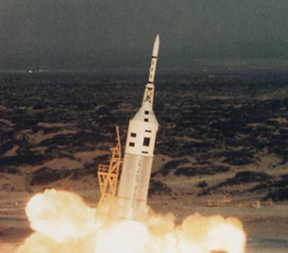 Esta imagem mostra O little joe II sendo lançado